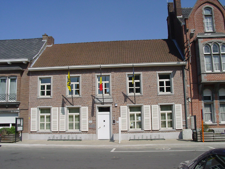 The Gemeentehuis (town hall) in Opwijk, Belgium, building 1